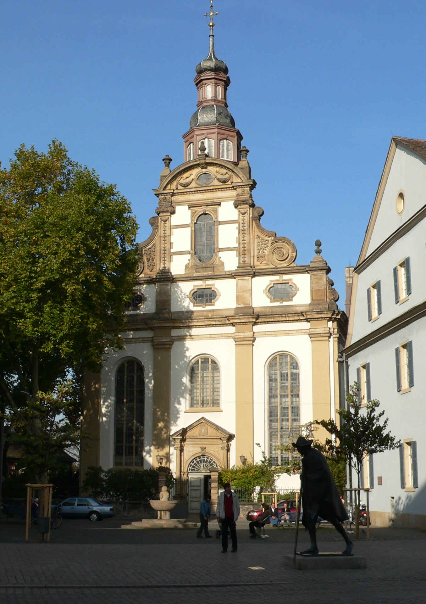 Church "Dreifaltigkeitskirche" near The Cathedral Of Speyer